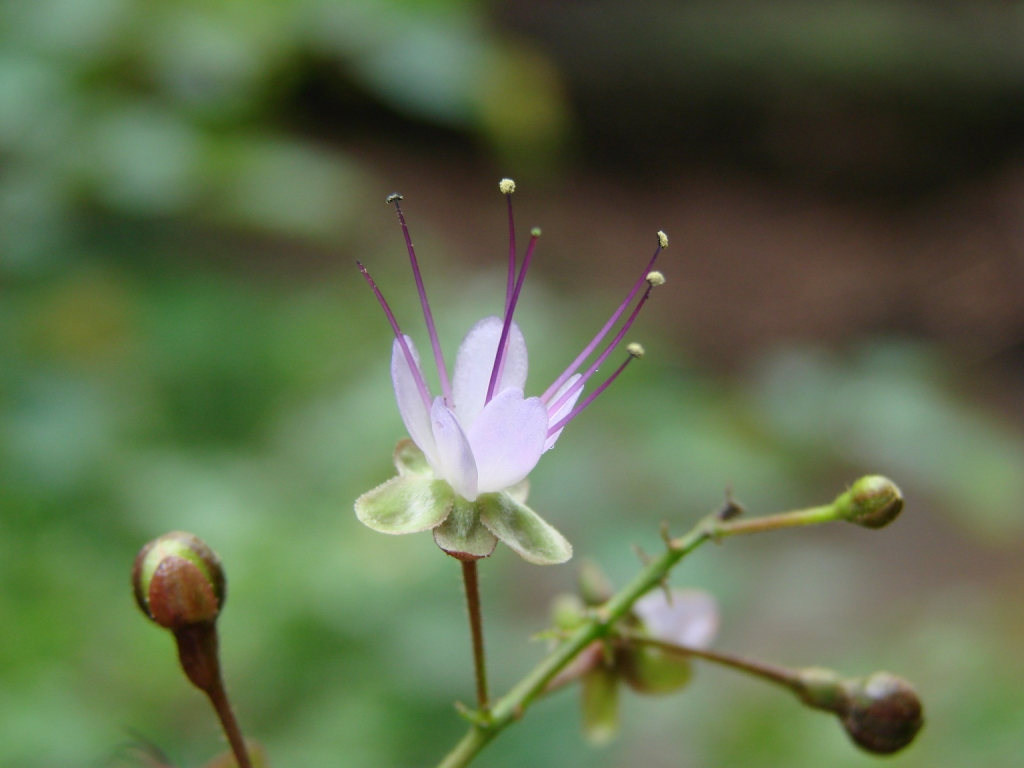 Hirtella gracilipes (Hook.f.) Prance - CHRYSOBALANACEAE - Área de Relevante Interesse Ecológico do Riacho Fundo - Brasília - Distrito Federal - Brasil.